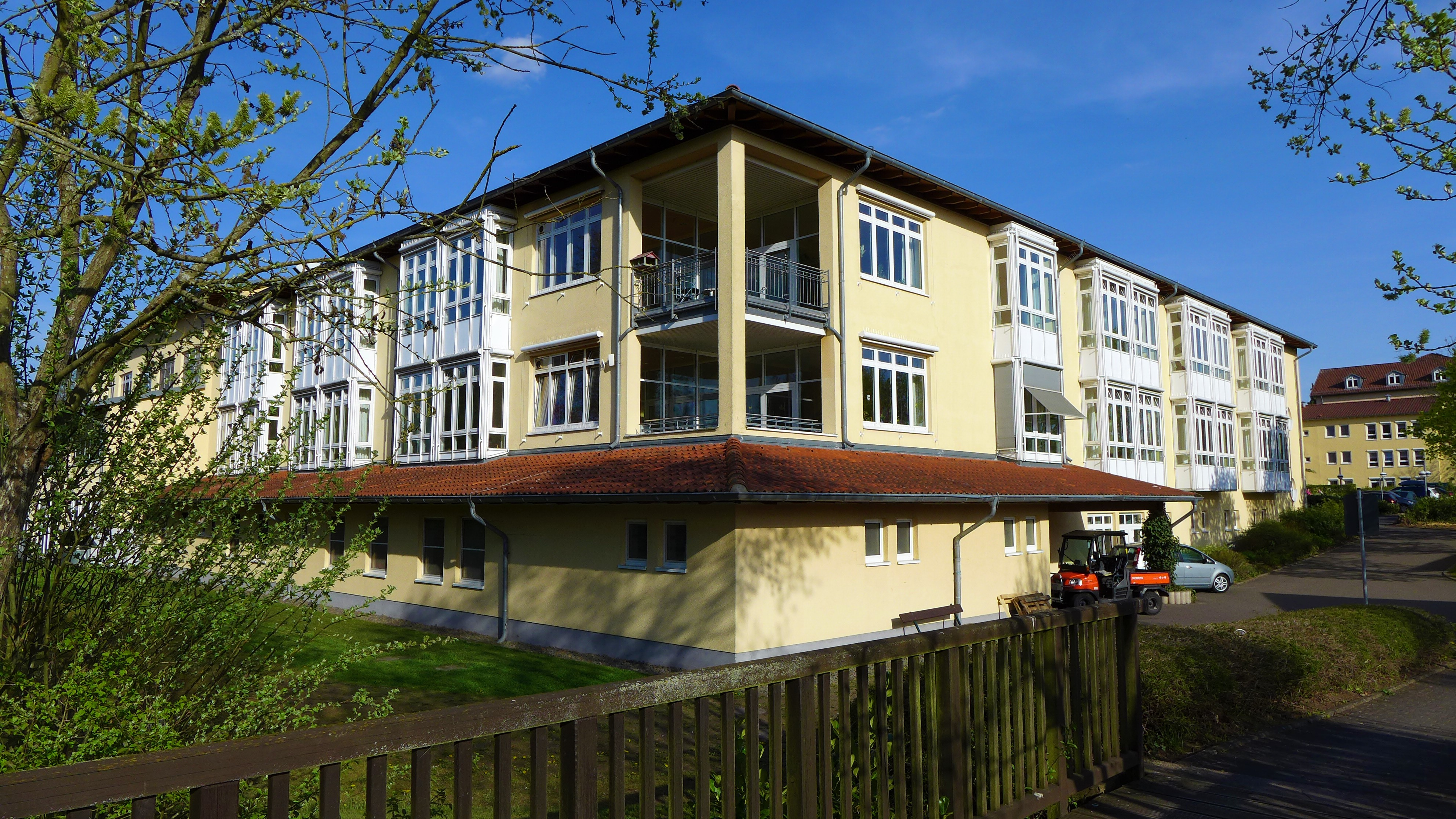 Wallerfangen, Fachklinik für Psychiatrie und Psychotherapie